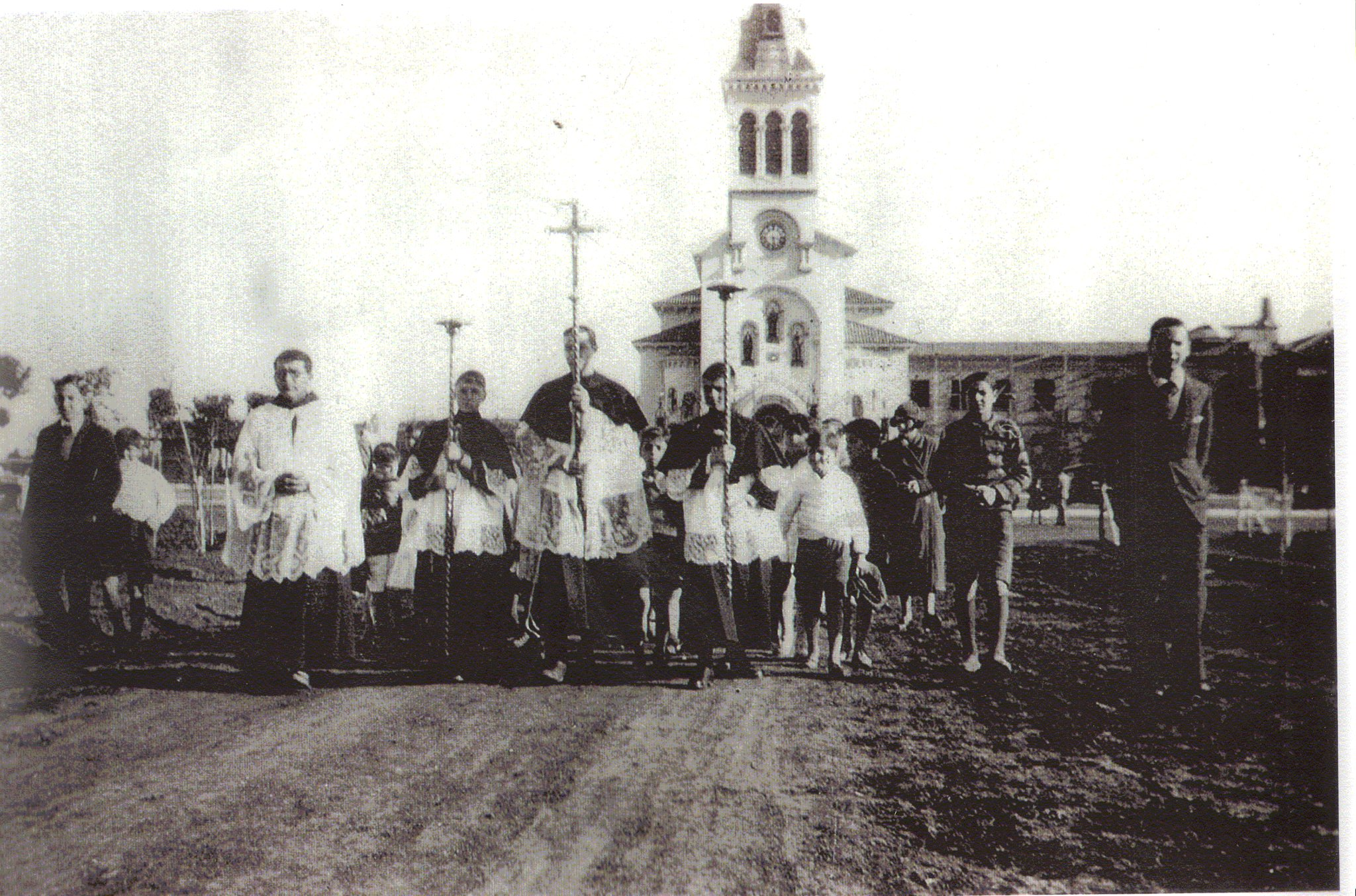 Proseción saliendo de la Iglesia de Padua, Merlo, Provincia de Buenos Aires.